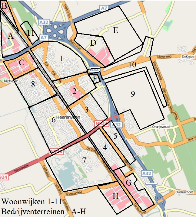 Heerenveen, woonwijken en bedrijventerreinen